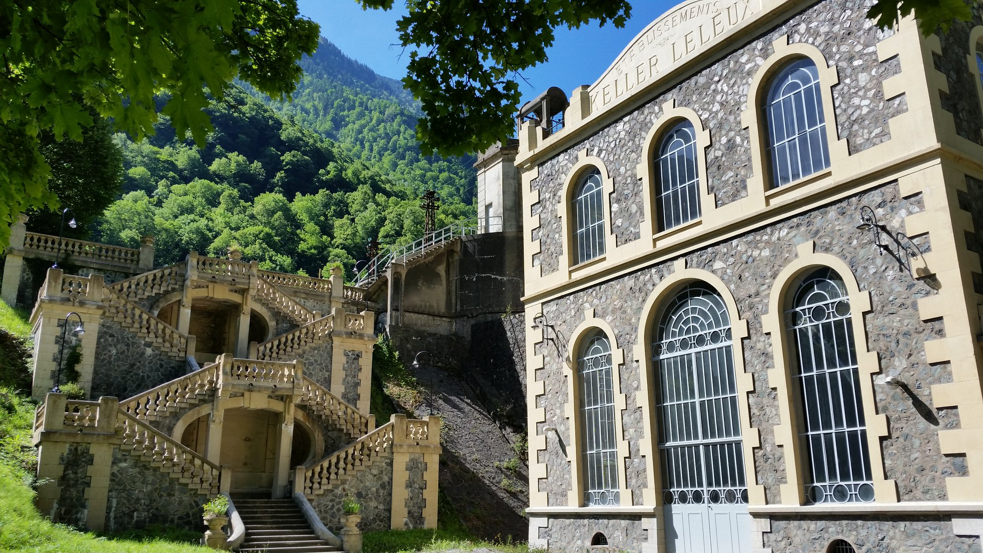 Centrale classée Monument historique